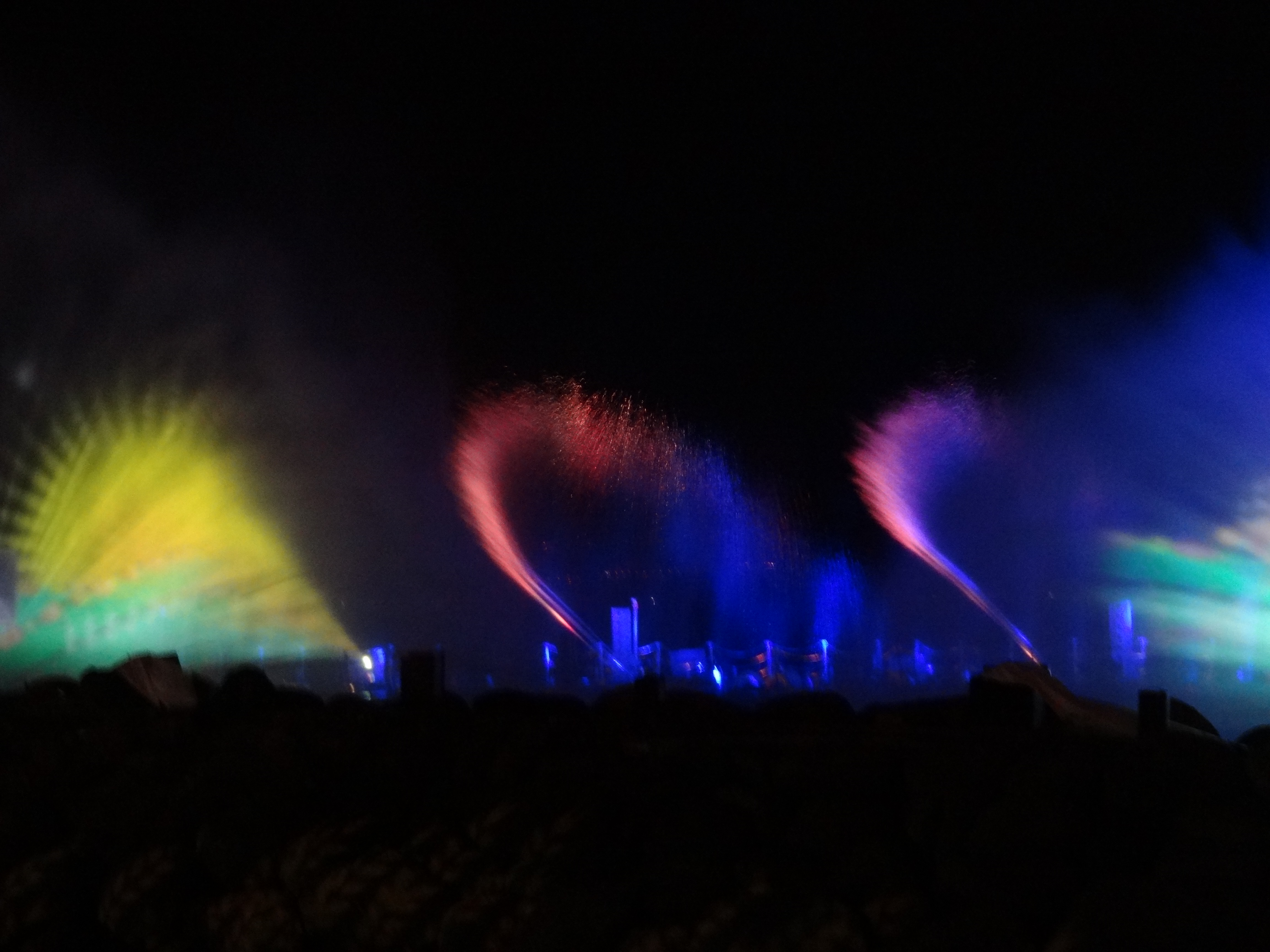 The Tiberium – a fabulous water spectacle on the Sea of Galilee, Israel טיבריום – מופע מים של צליל אורות ותמונות על הכנרת, בטיילת של טבריה